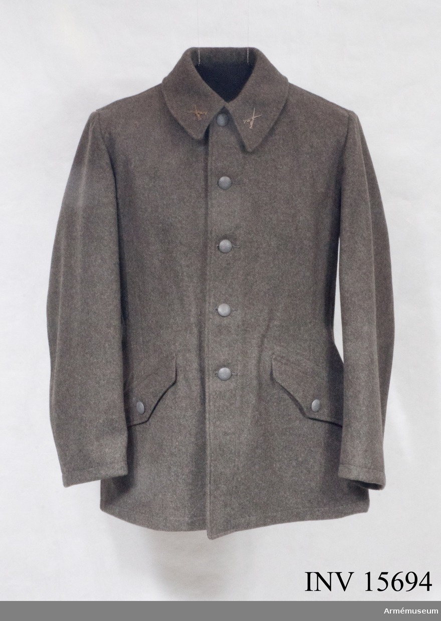 Vapenrock m/1958 för manskap vid infanteriet Identifikationsnr: AM.015694 Samling: Armémuseum